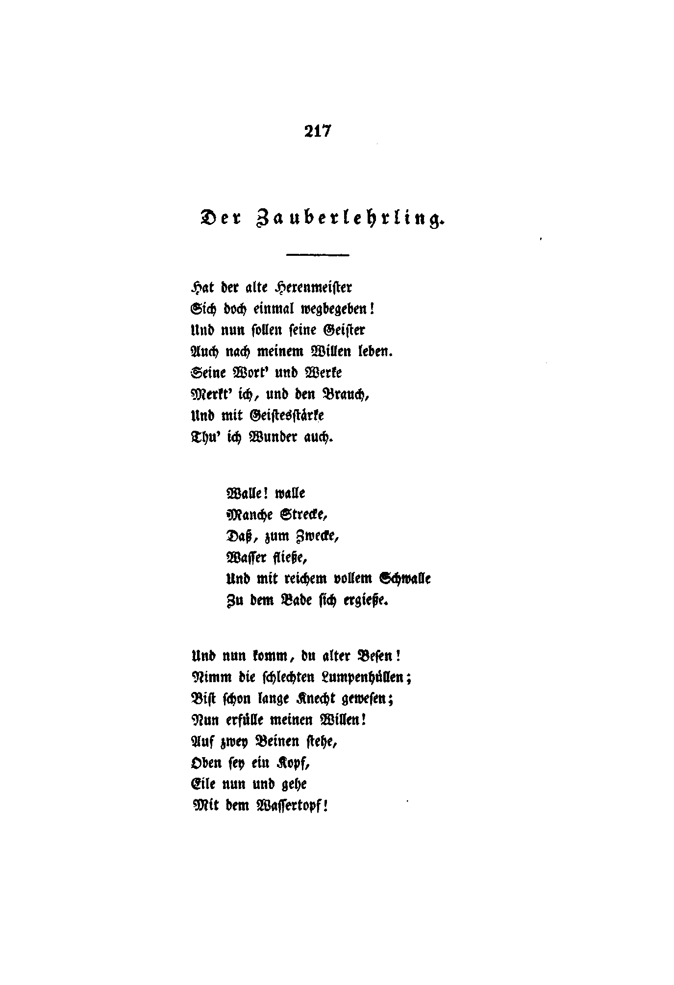 Der Zauberlehrling aus: Goethes Werke. Vollständige Ausgabe letzter Hand. Erster Band. S. 217–220